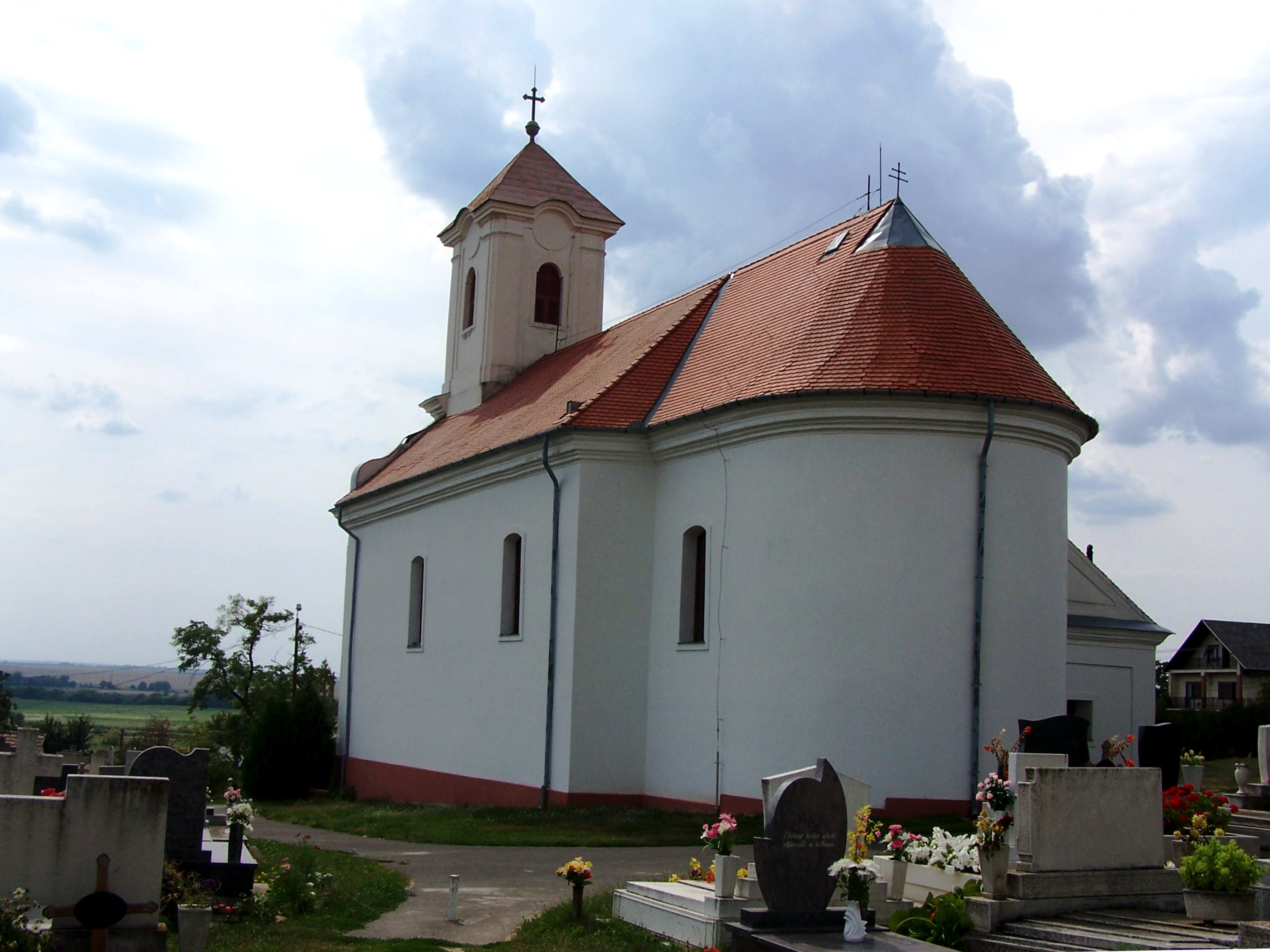 Római katolikus templom (Szent Kereszt felmagasztalása) (Szurdokpüspöki, Püspöki, I. ker. Zagyvaszentjakabi temető, Arany János u. 20.)